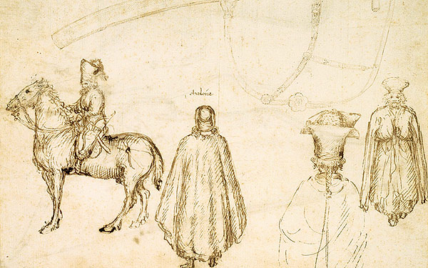 Pisanello, john viii palaeiologus drawings